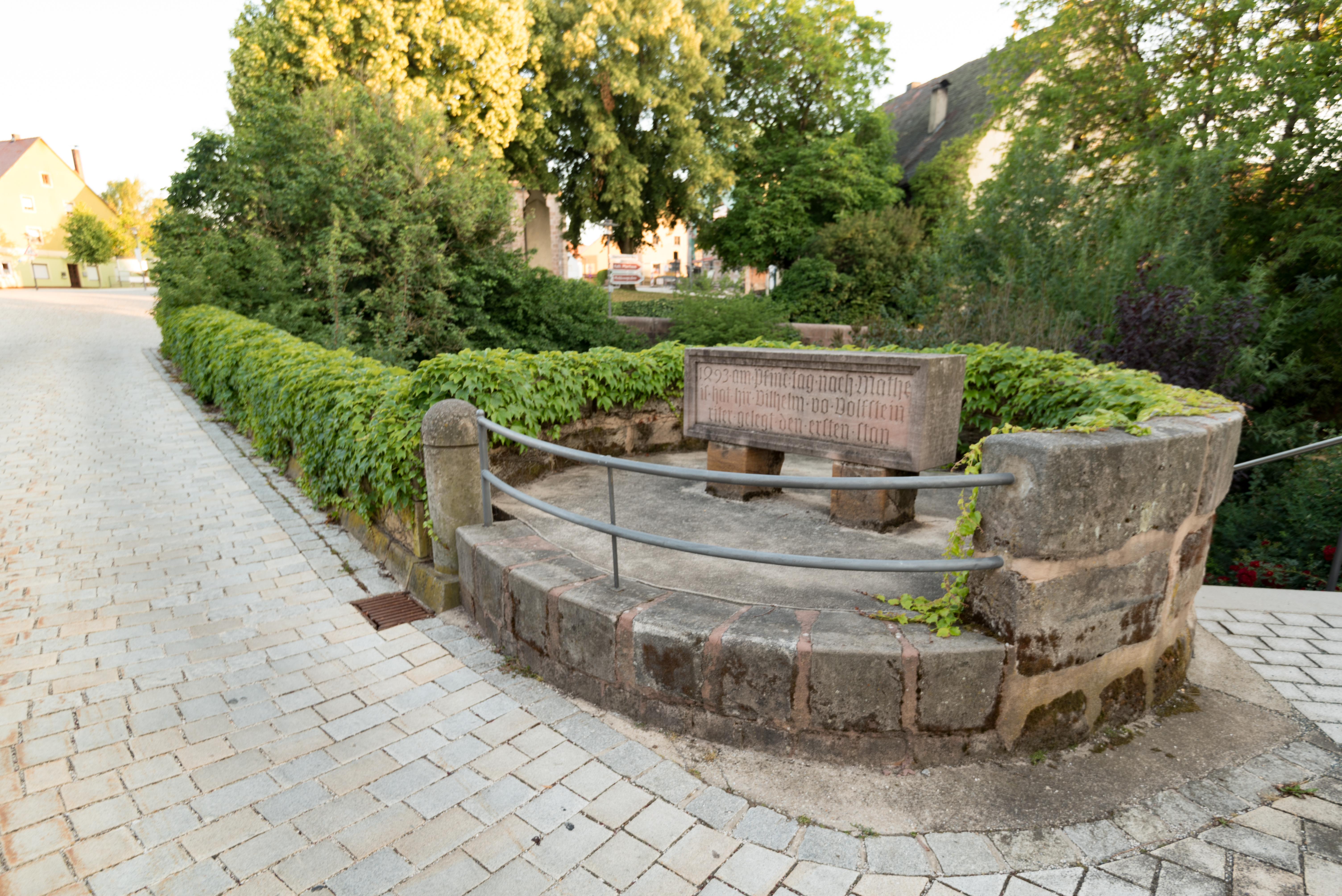 Pyrbaum, Schloßhof 1